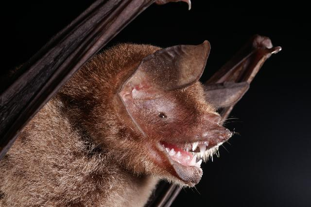 Pteronotus parnellii